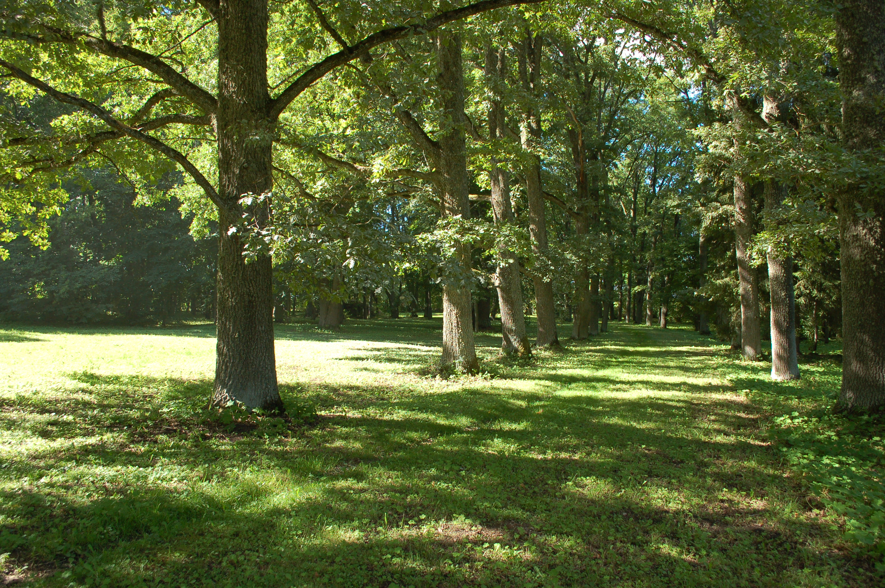 Teerada läbi pargi